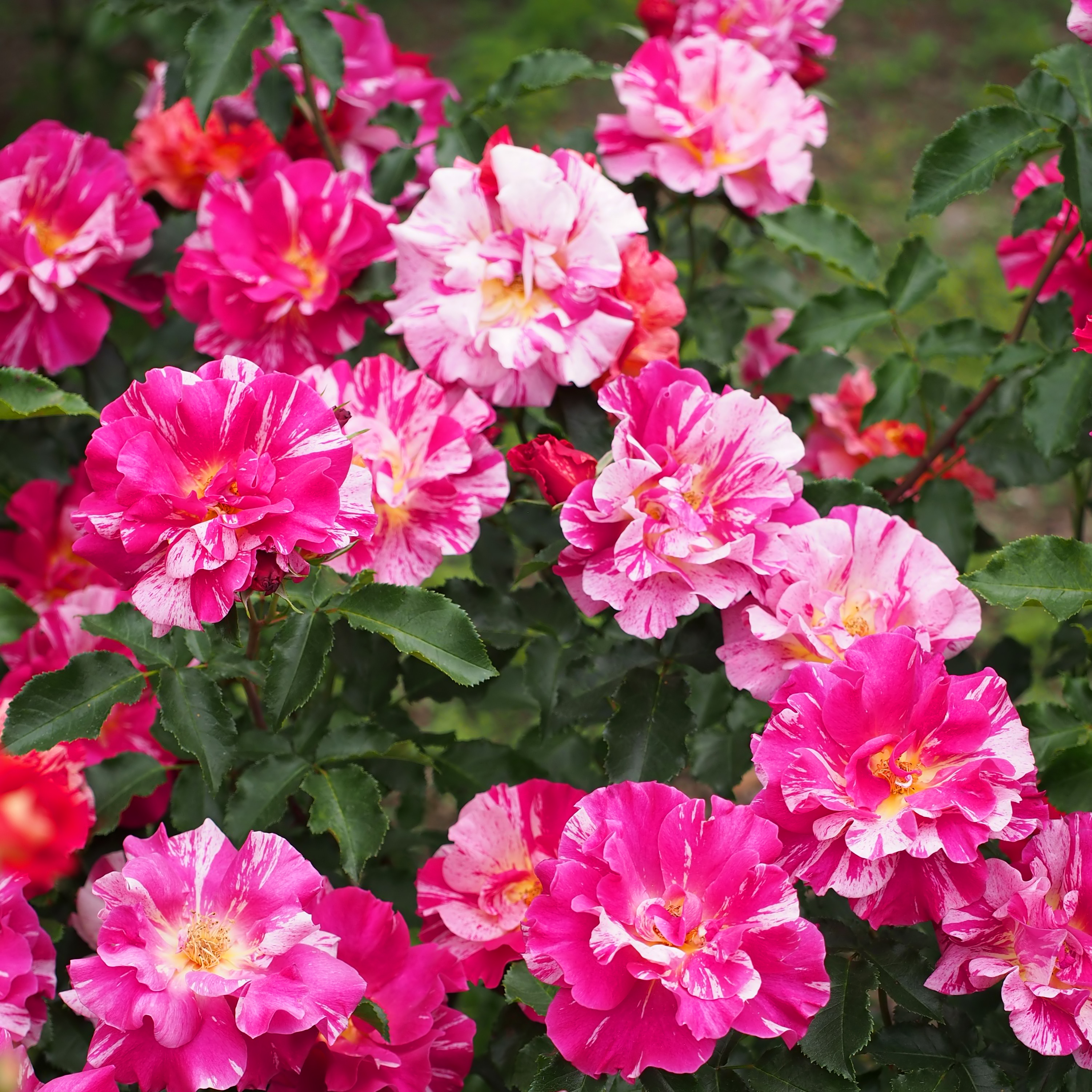 Rose, Edgar Degas, バラ, エドガー ドガ, Shrub rose シュラブ France フランス Delbard 2003